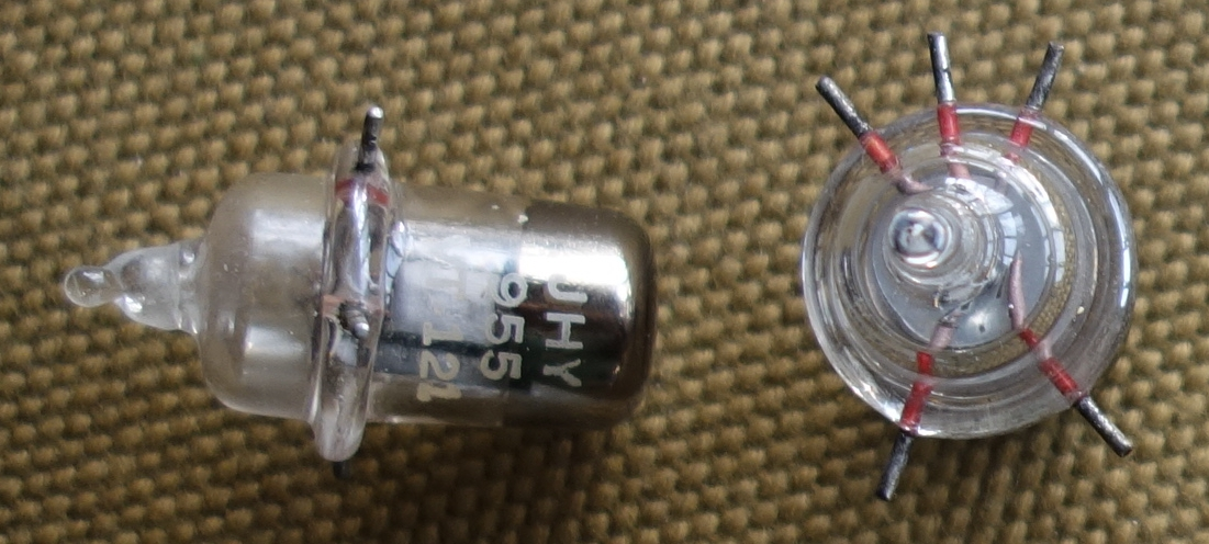 955 UHF acorn triode up to about 900 MHz